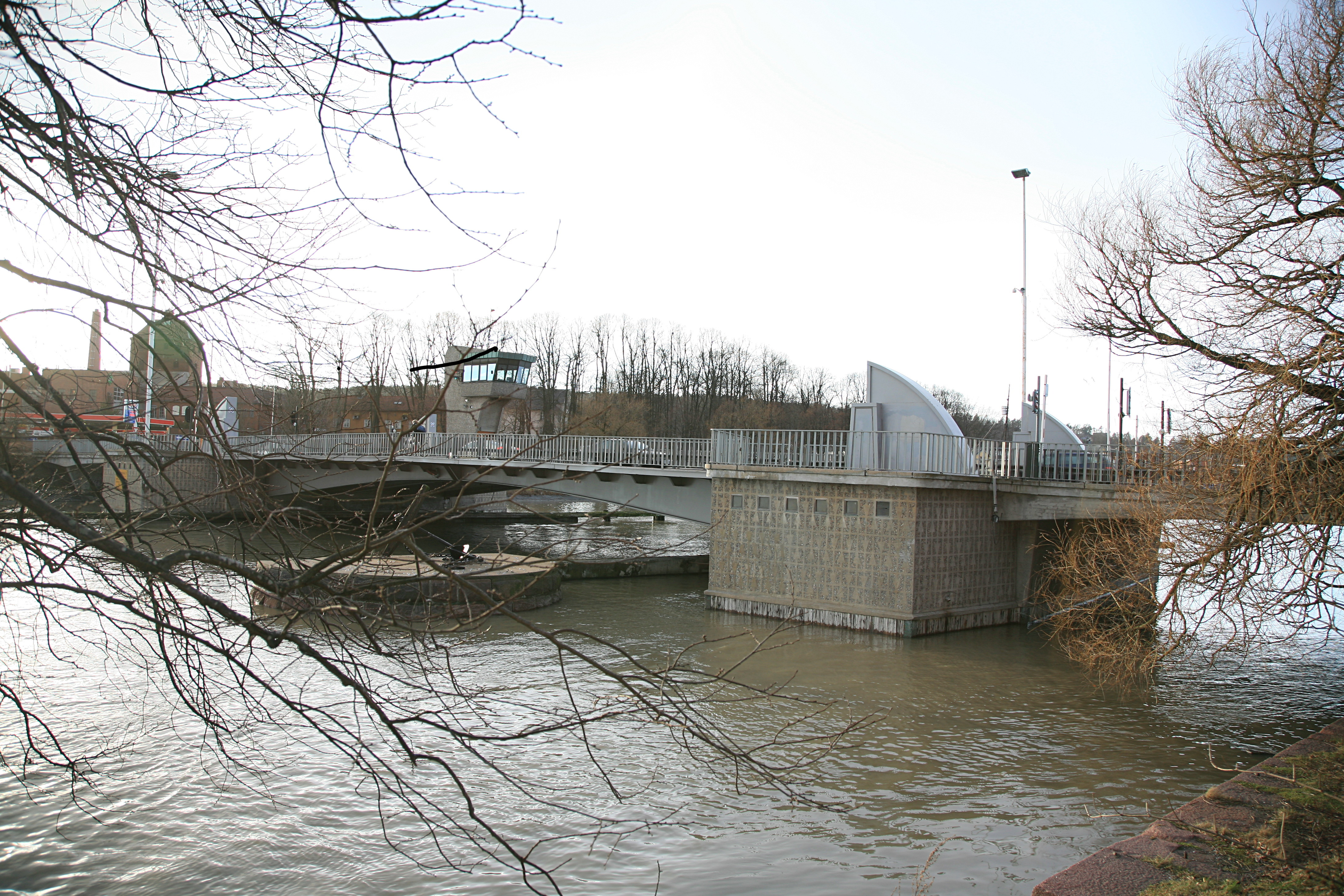 A bridge between Tønsberg anf Nøtterøy in Vestfold Norway